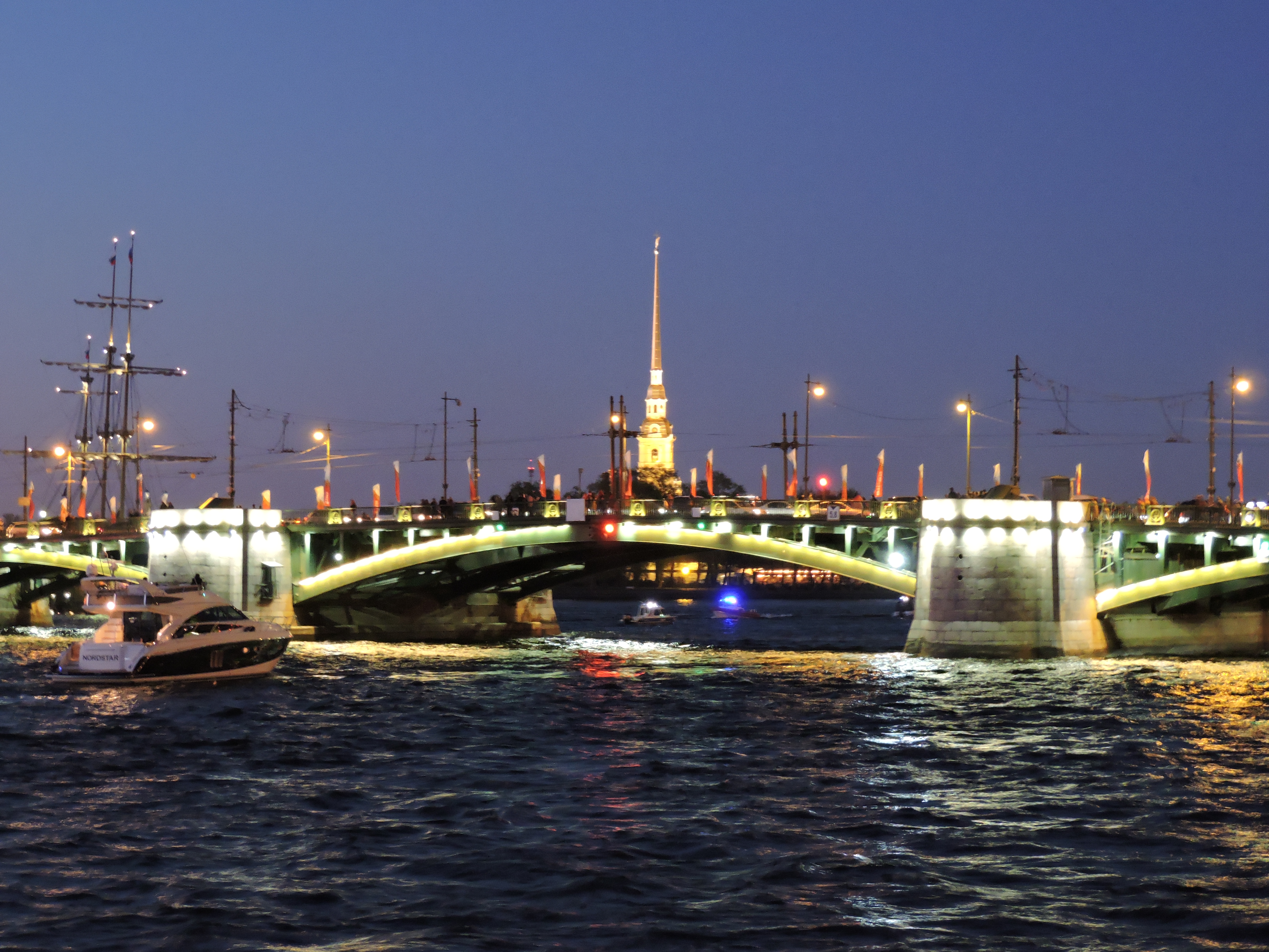 Разводная часть Биржевого моста